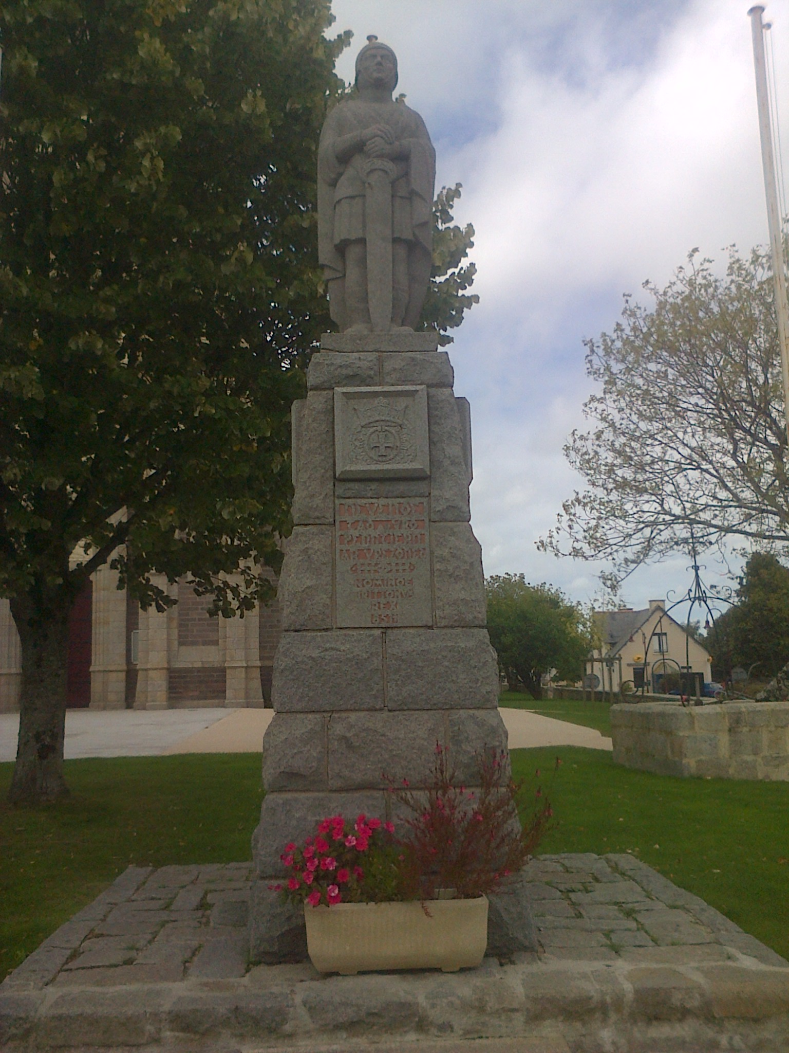 Delwenn Nevenoe e Baen-Ballon (35600). Savet an 23 a viz Even 1952 gant ar gevredigezh Mignoned Nevenoe. Ur skrivadur a zo: "Nevenoe Tad ar Vro, Penntiern ar Vrezhoned; Nominoe Brittonum Rex 851"